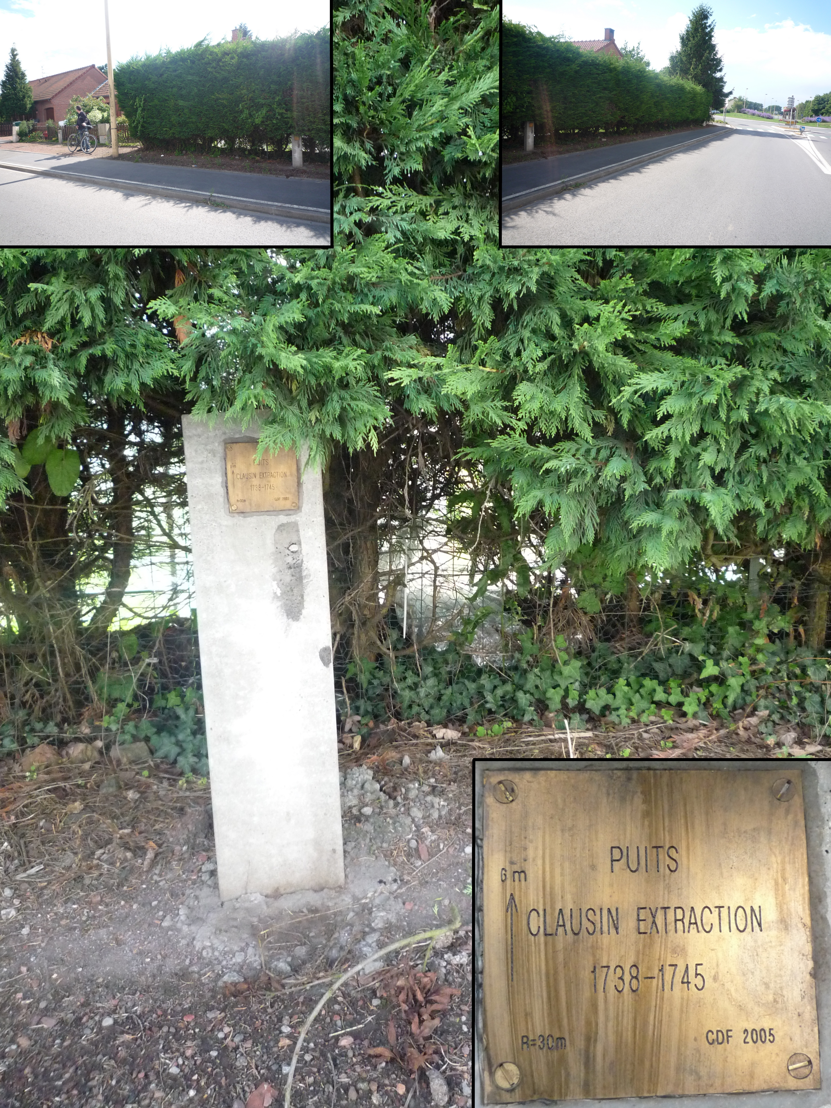 Puits Clausin Extraction de la Compagnie des mines d'Anzin à Fresnes-sur-Escaut, Nord, Nord-Pas-de-Calais, France.